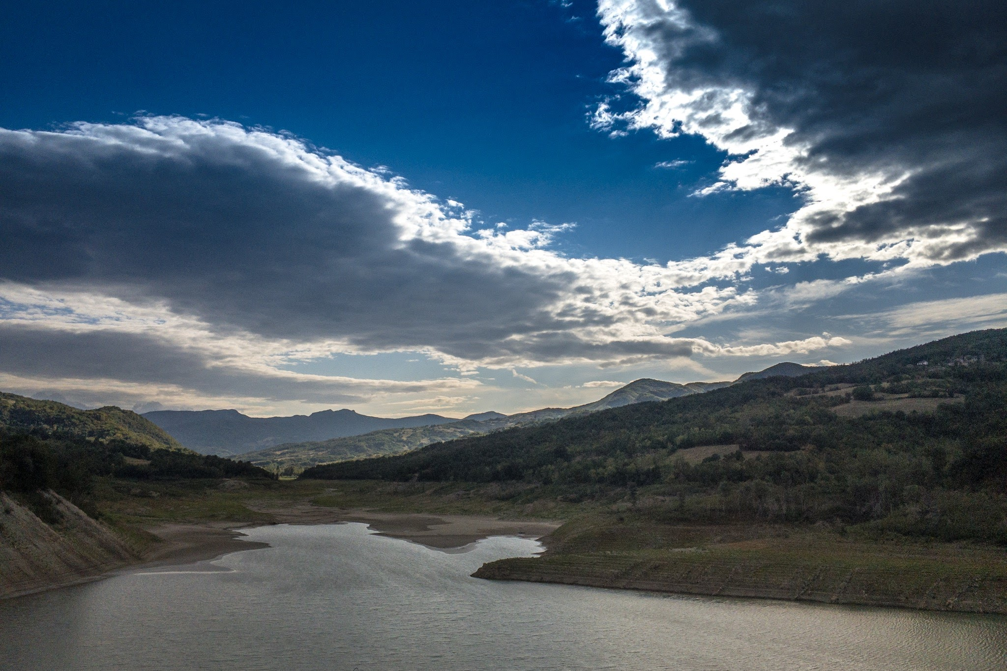 Foto del bacino quasi vuoto estate 2017